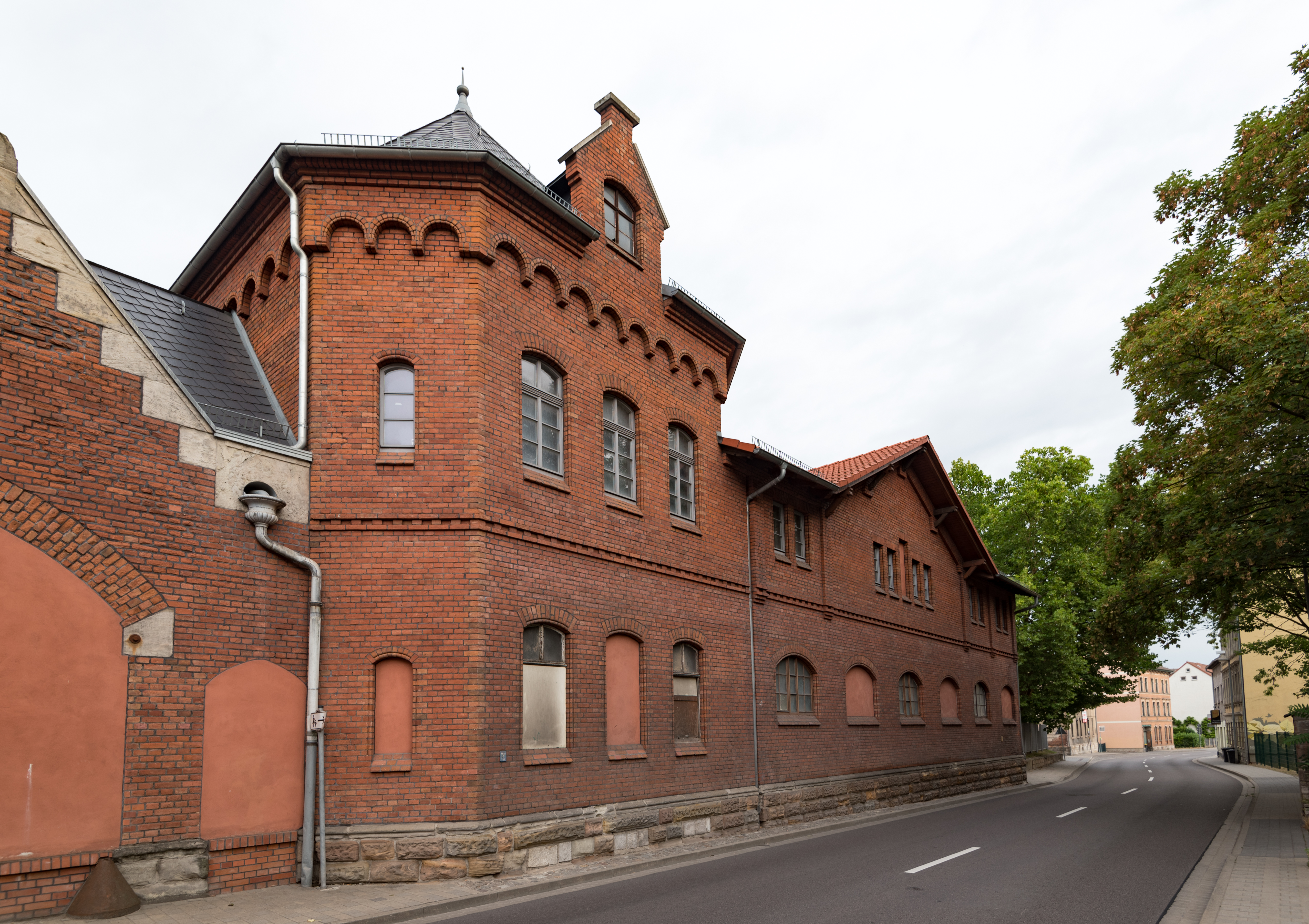 Weißenfels, Langendorfer Straße 17